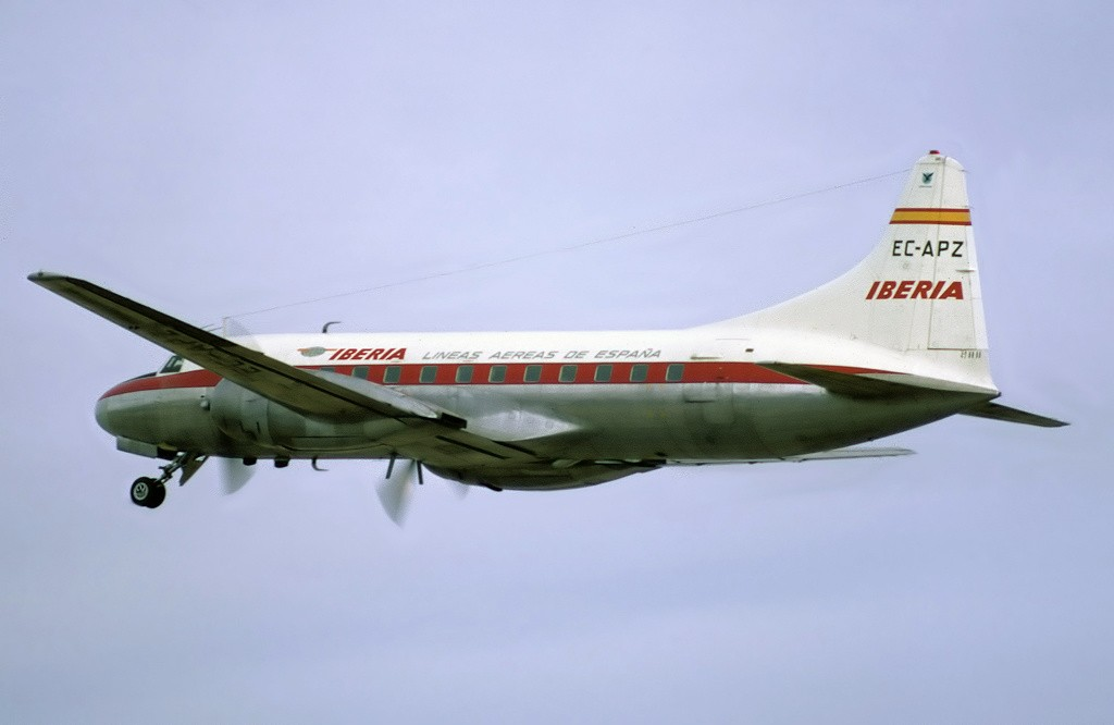 EC-APZ (cn 495) Evening departure to MAD